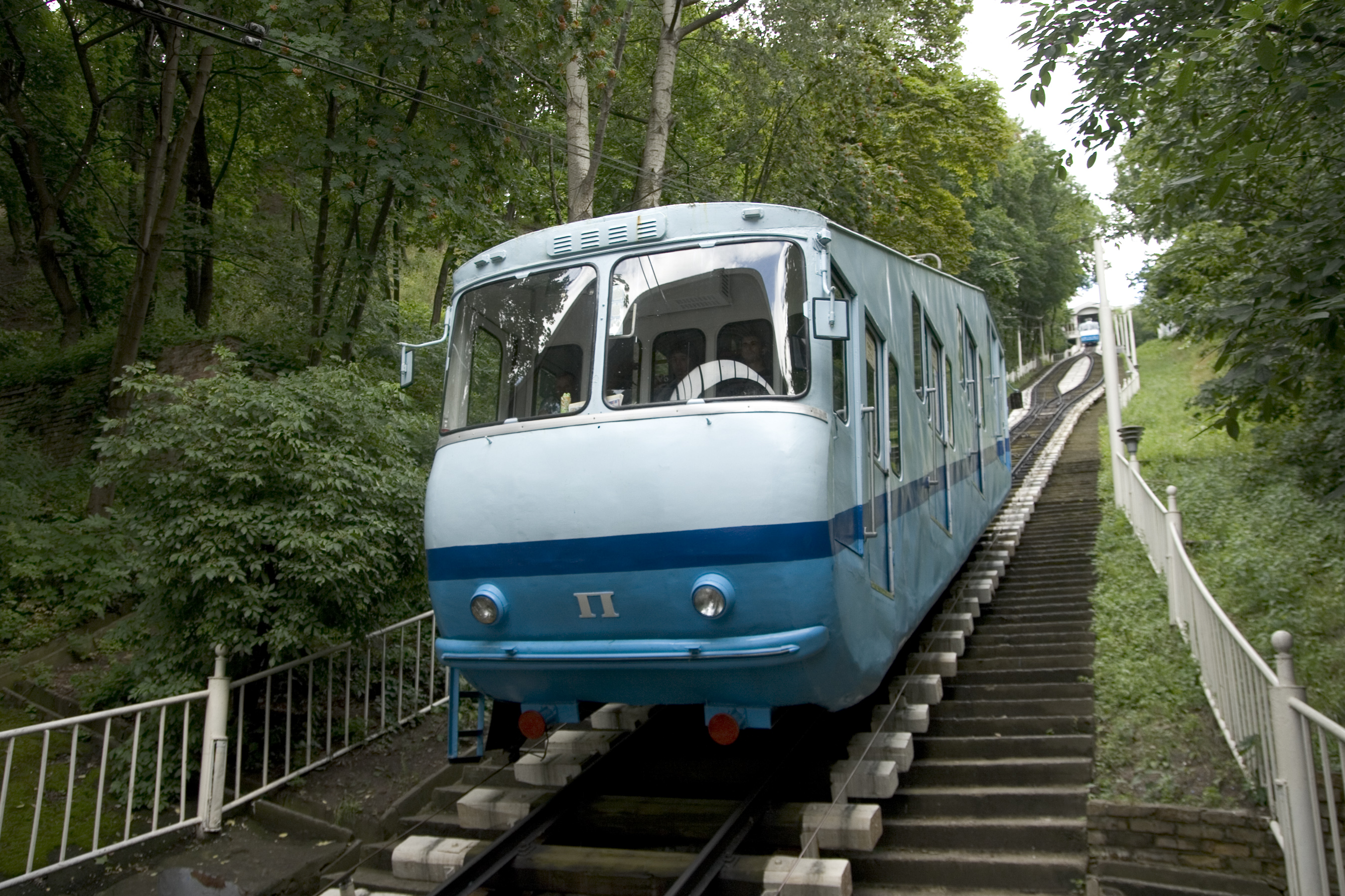 Київський фунікулер